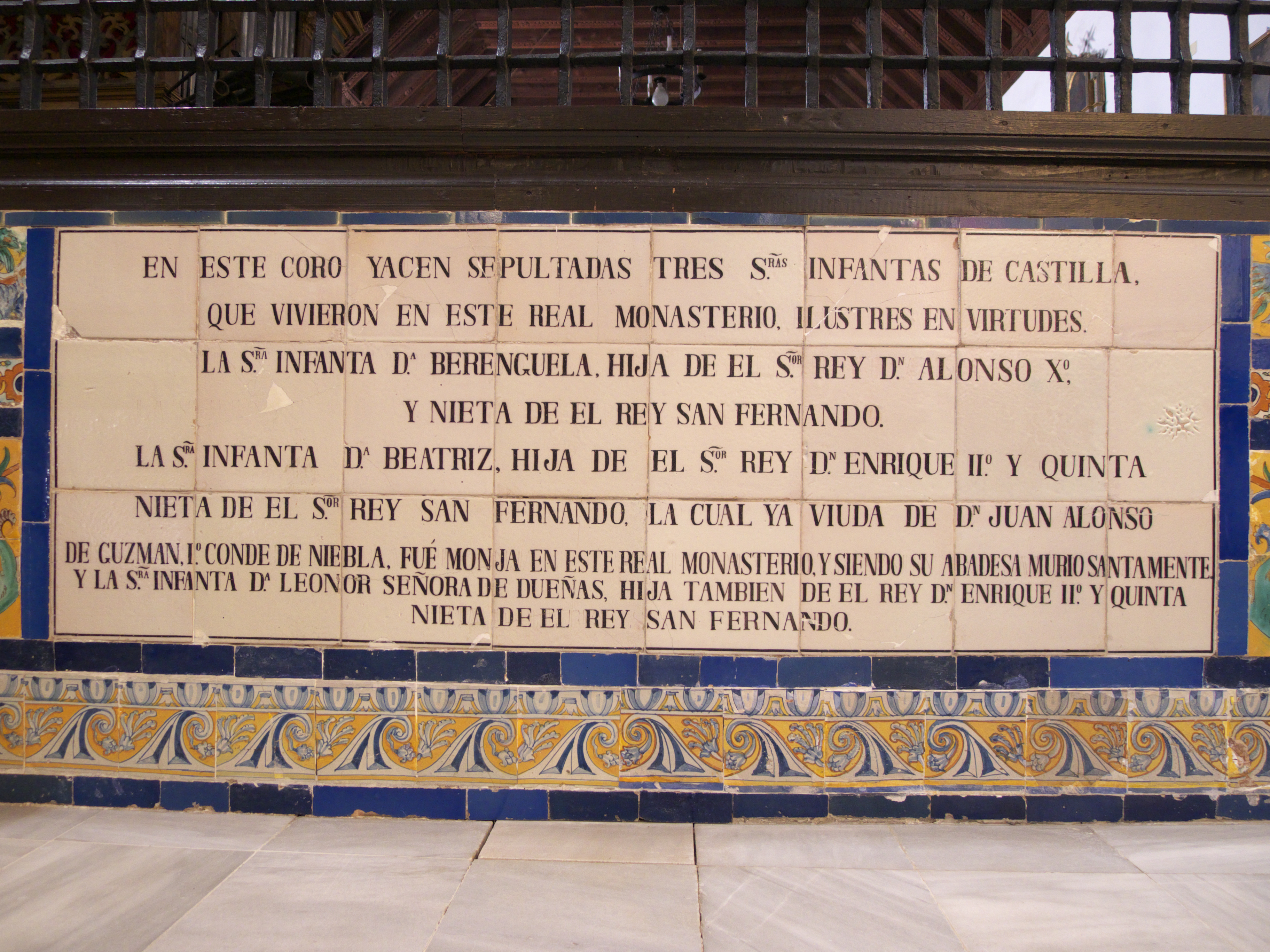 En el monasterio de San Clemente de Sevilla, (España), además de la reina María de Portugal, que fue la esposa del rey Alfonso XI de Castilla, y su hijo Fernando de Castilla (†1333), también fueron enterradas la infanta Berenguela de Castilla, que era hija del rey Alfonso X el Sabio, aunque otros autores aseguran que no fue enterrada aquí, Beatriz de Castilla († 1409) y su hermana Leonor (†1413), hijas de Enrique II.